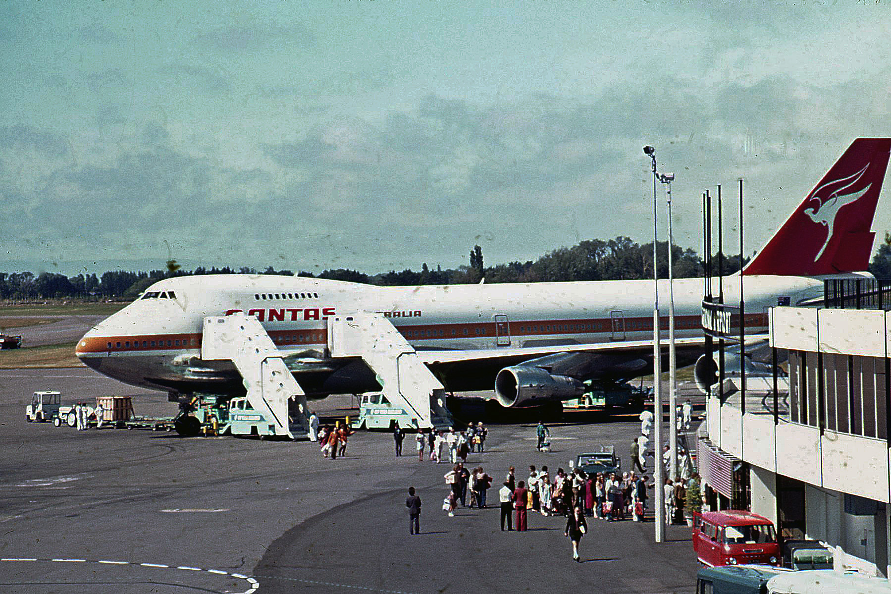 747, Christchurch, 1978